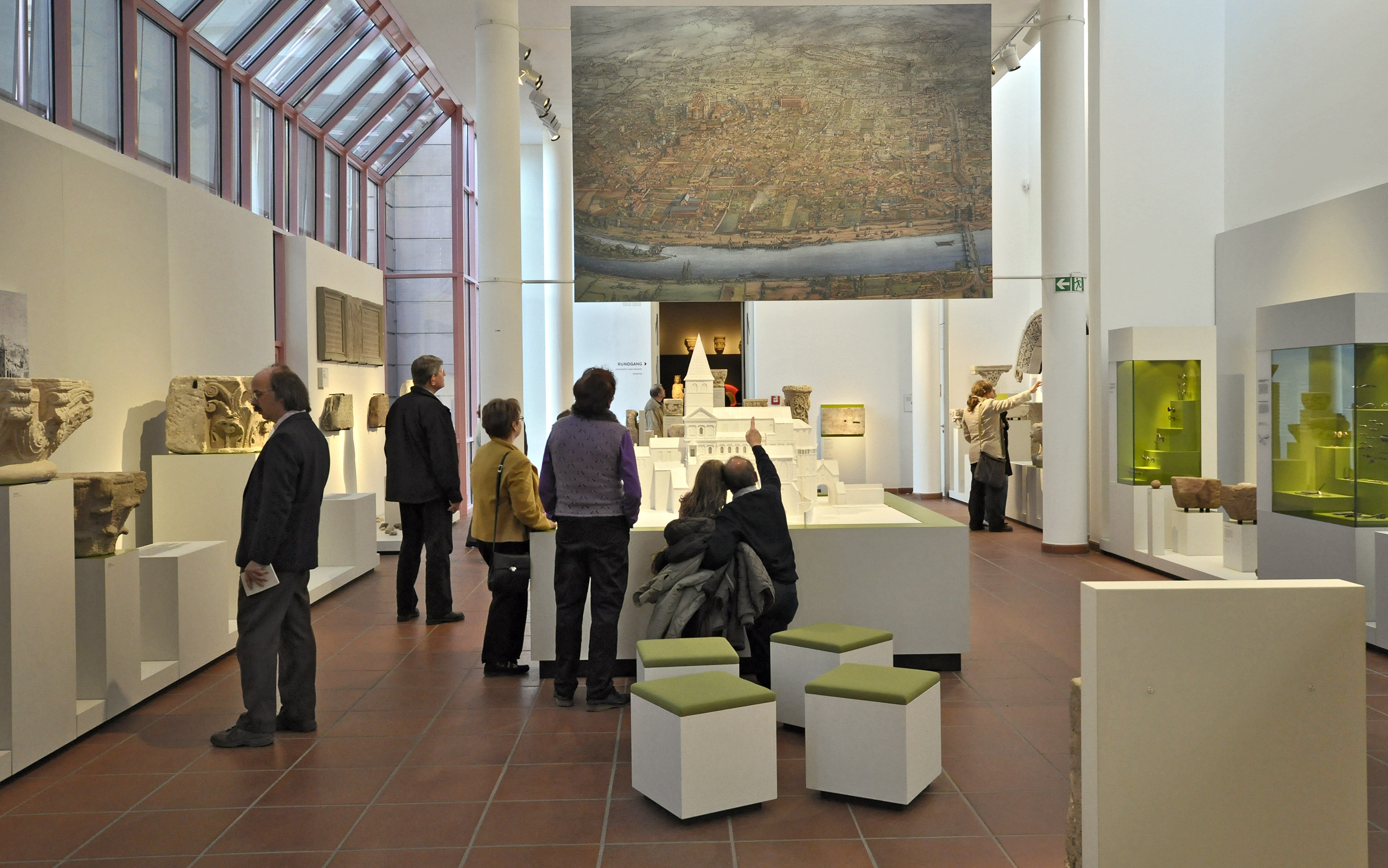 Blick in den Ausstellungsraum „Nach der Römerzeit“